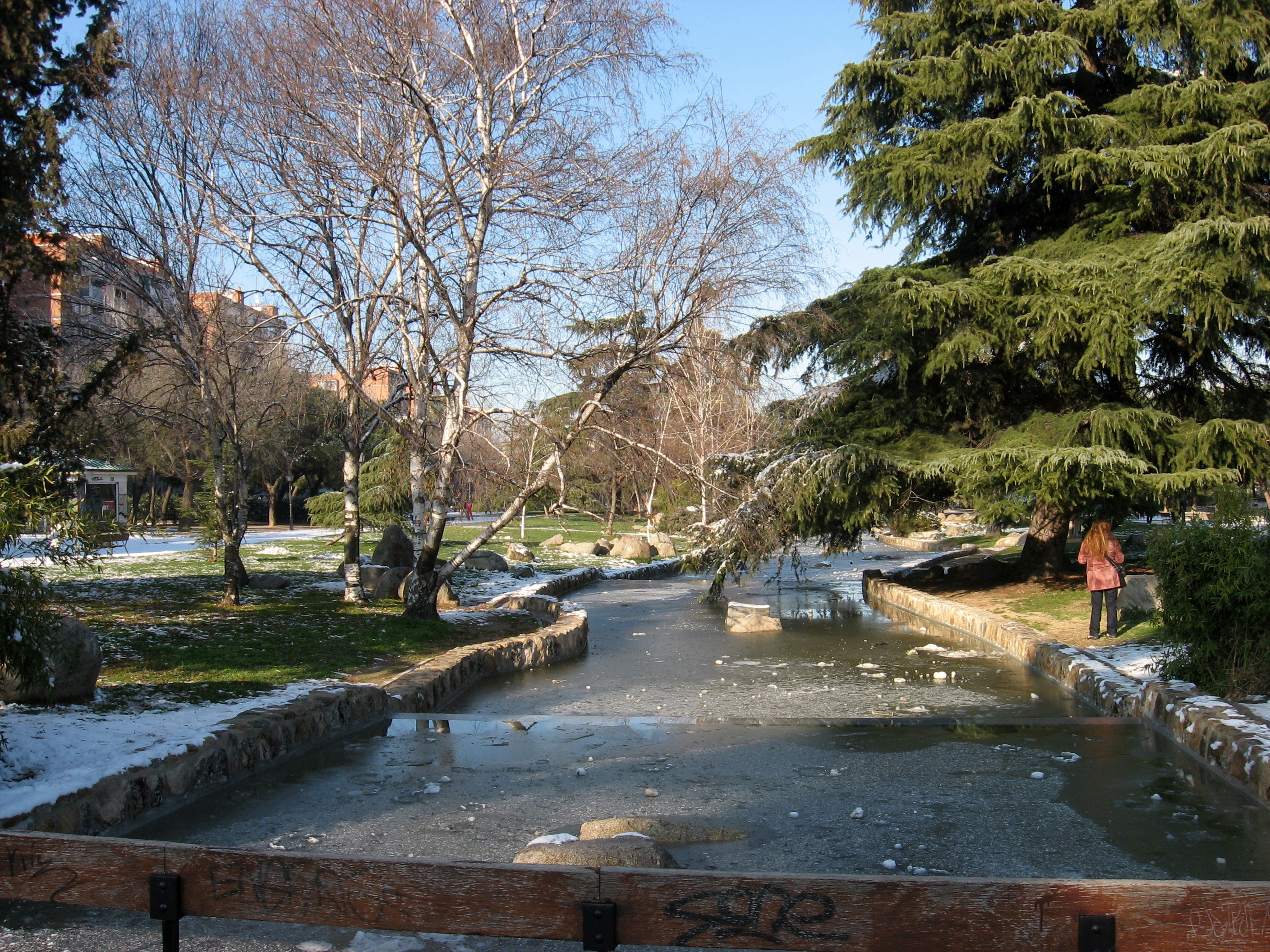 Nevada Madrid 2K9